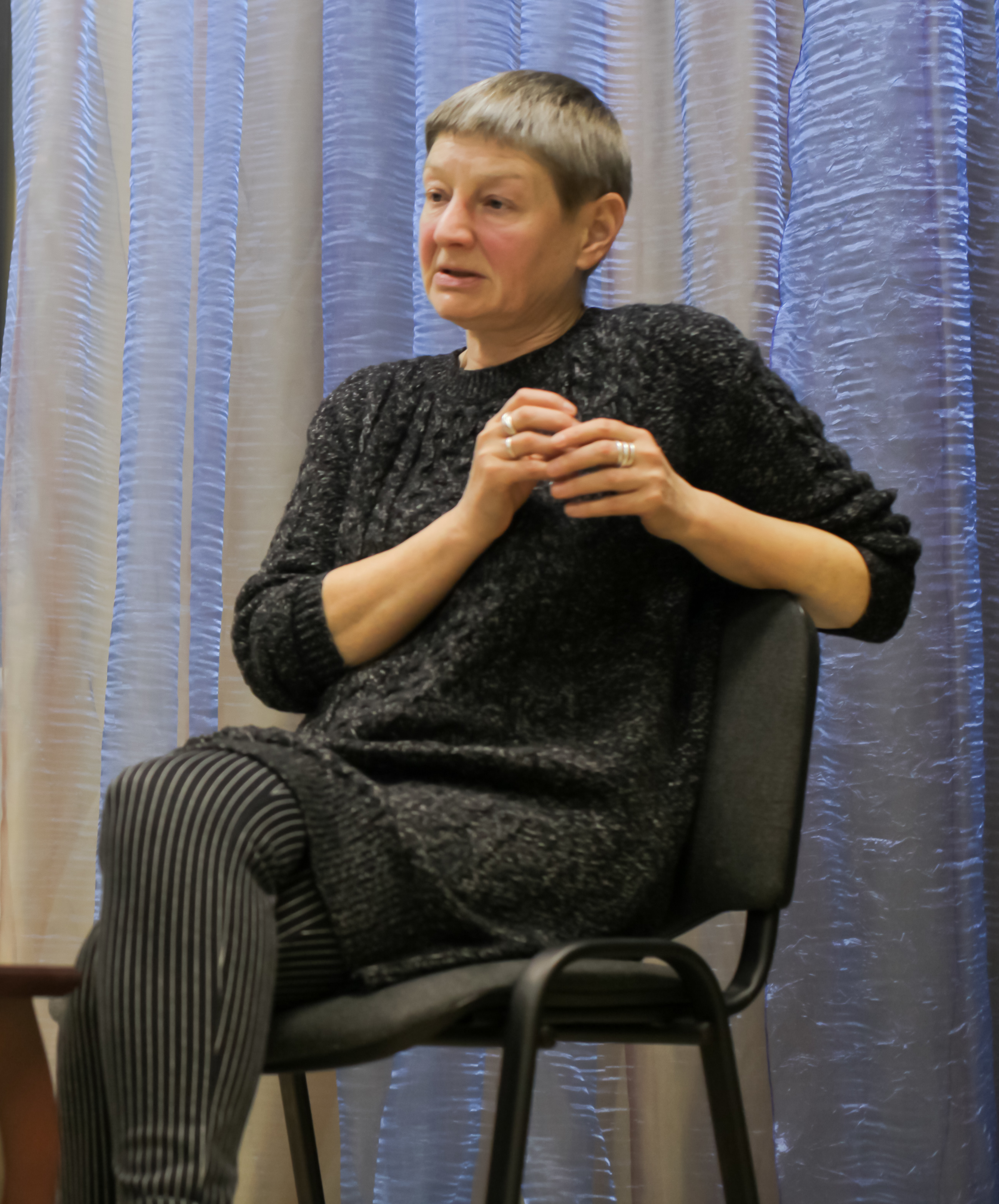 Актриса Екатерина Львовна Дурова ("Библионочь-2016" в библиотеке им. М.Ю.Лермонтова, Москва)